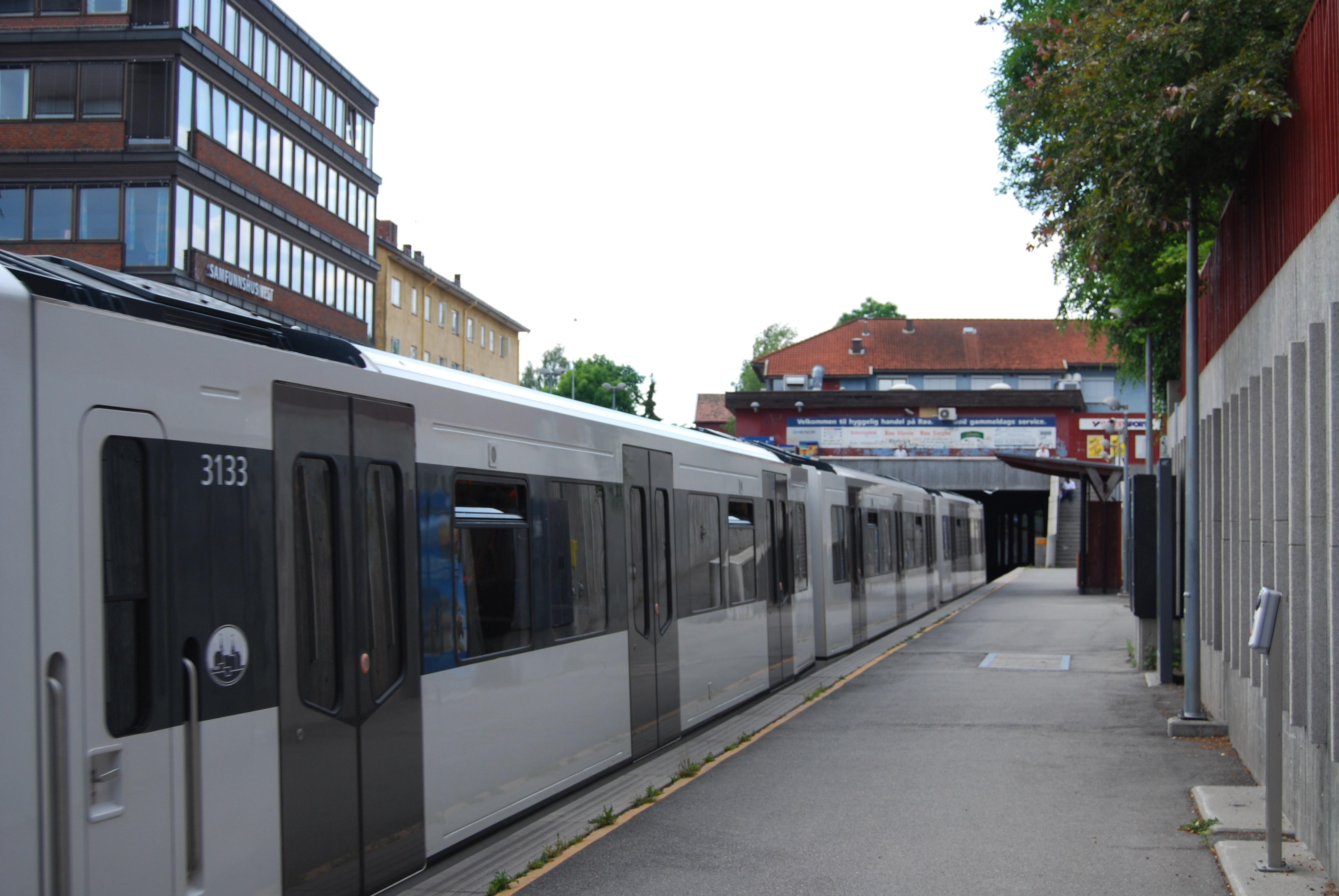 Røa stasjon (Oslo) 2009 r.